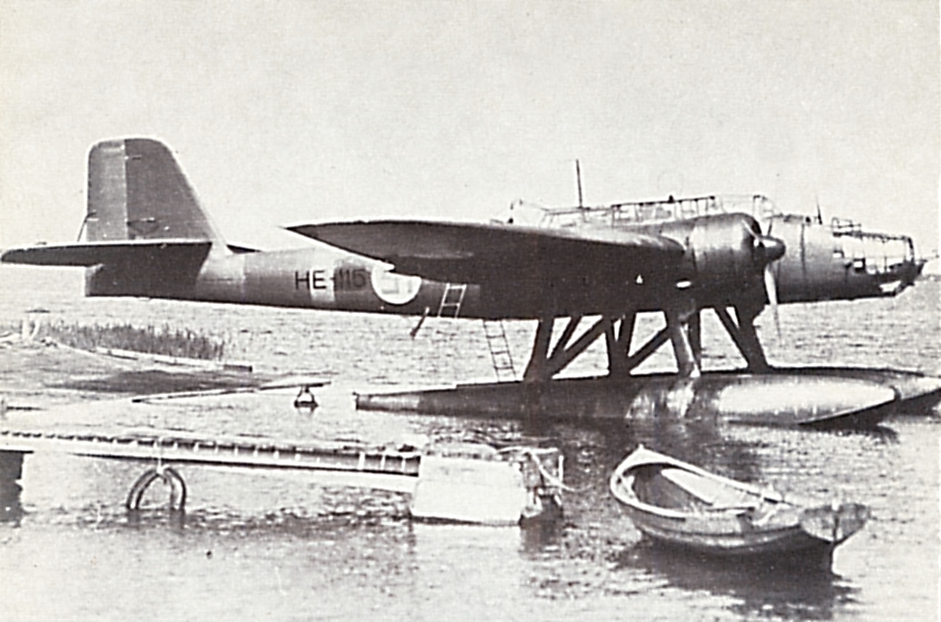 Heinkel 115, konetta käytettiin kaukopartiomiesten kuljettamiseksi rintaman taakse, kone kuljetti 12 - 14 miestä varusteineen.